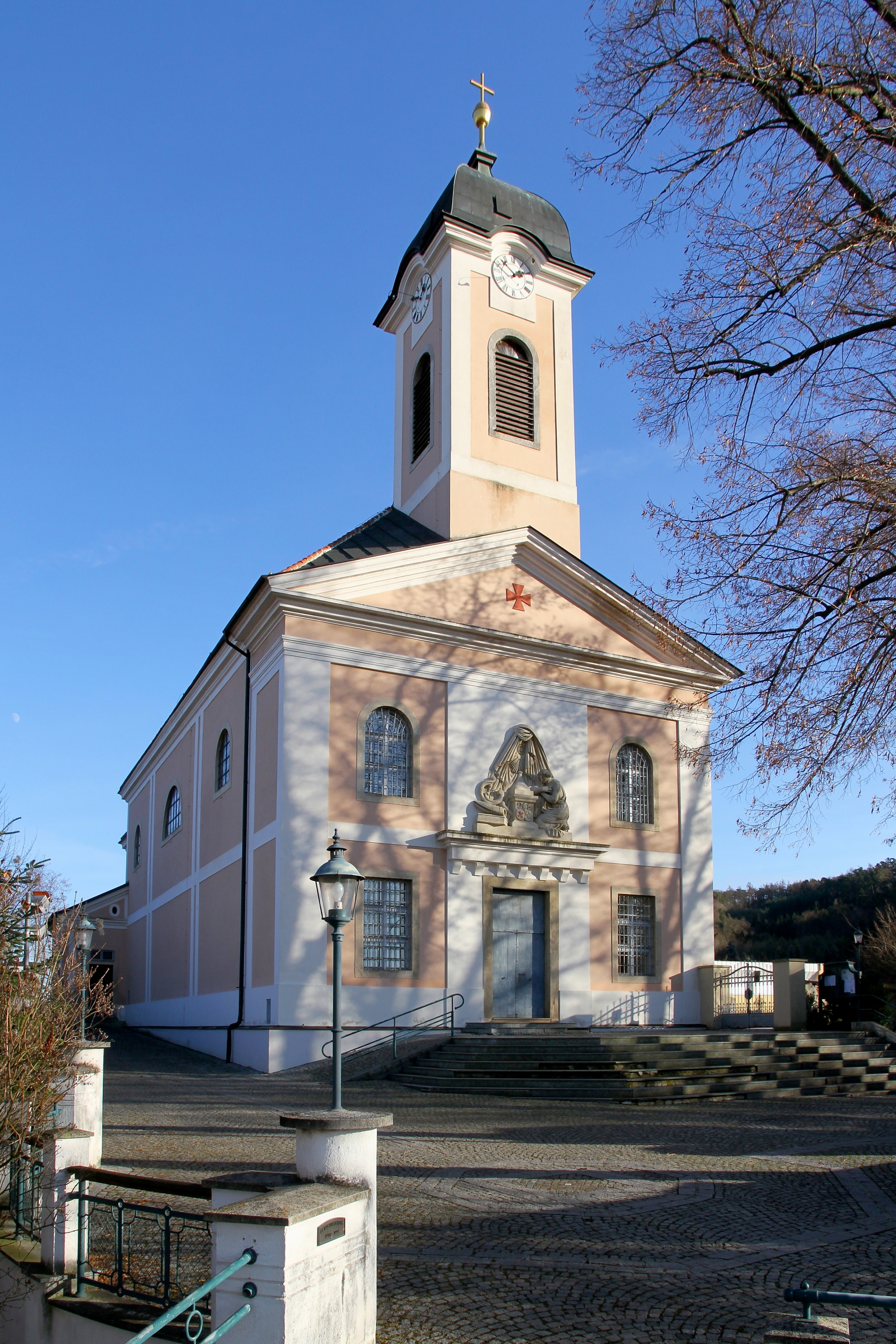 Katholische Pfarrkirche hl. Jakobus d. Ä. in Reidling, ein Ortsteil der niederösterreichischen Gemeinde Sitzenberg-Reidling.